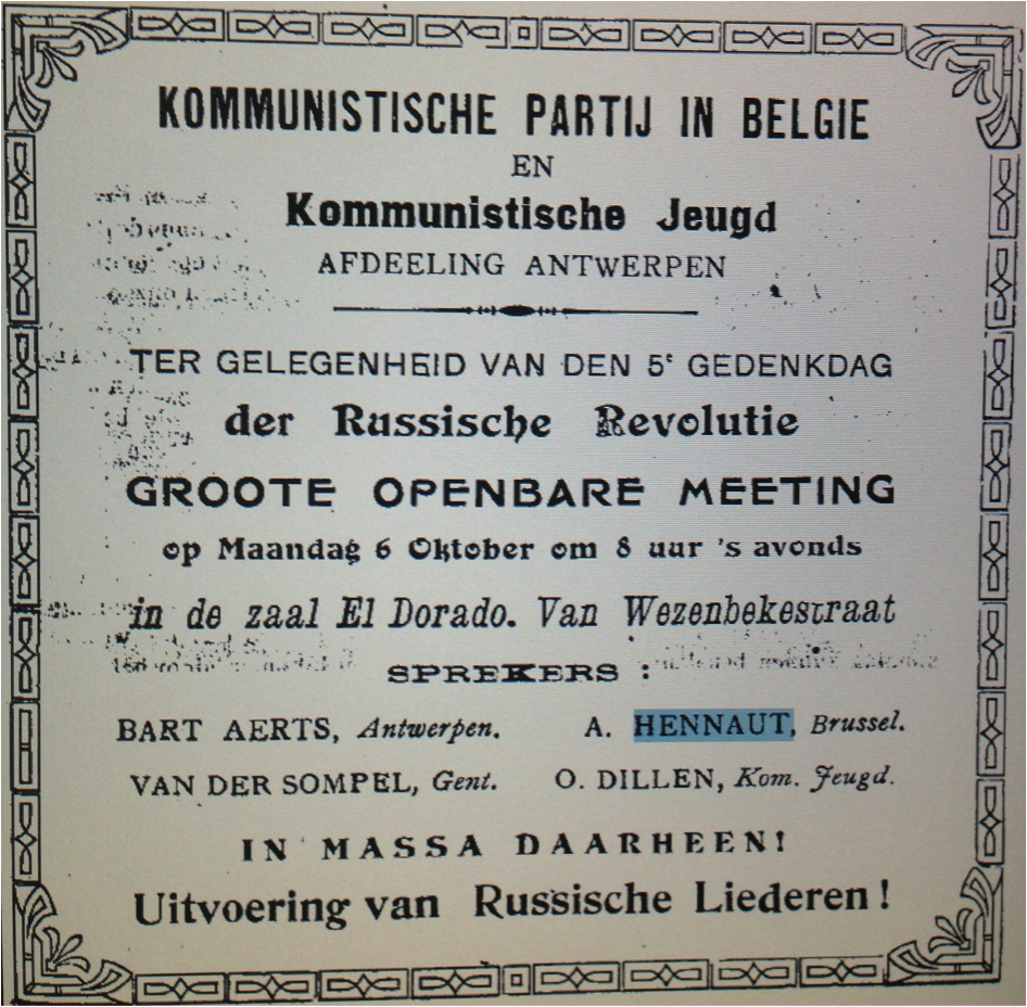 Drapeau Rouge, Septembre 1927